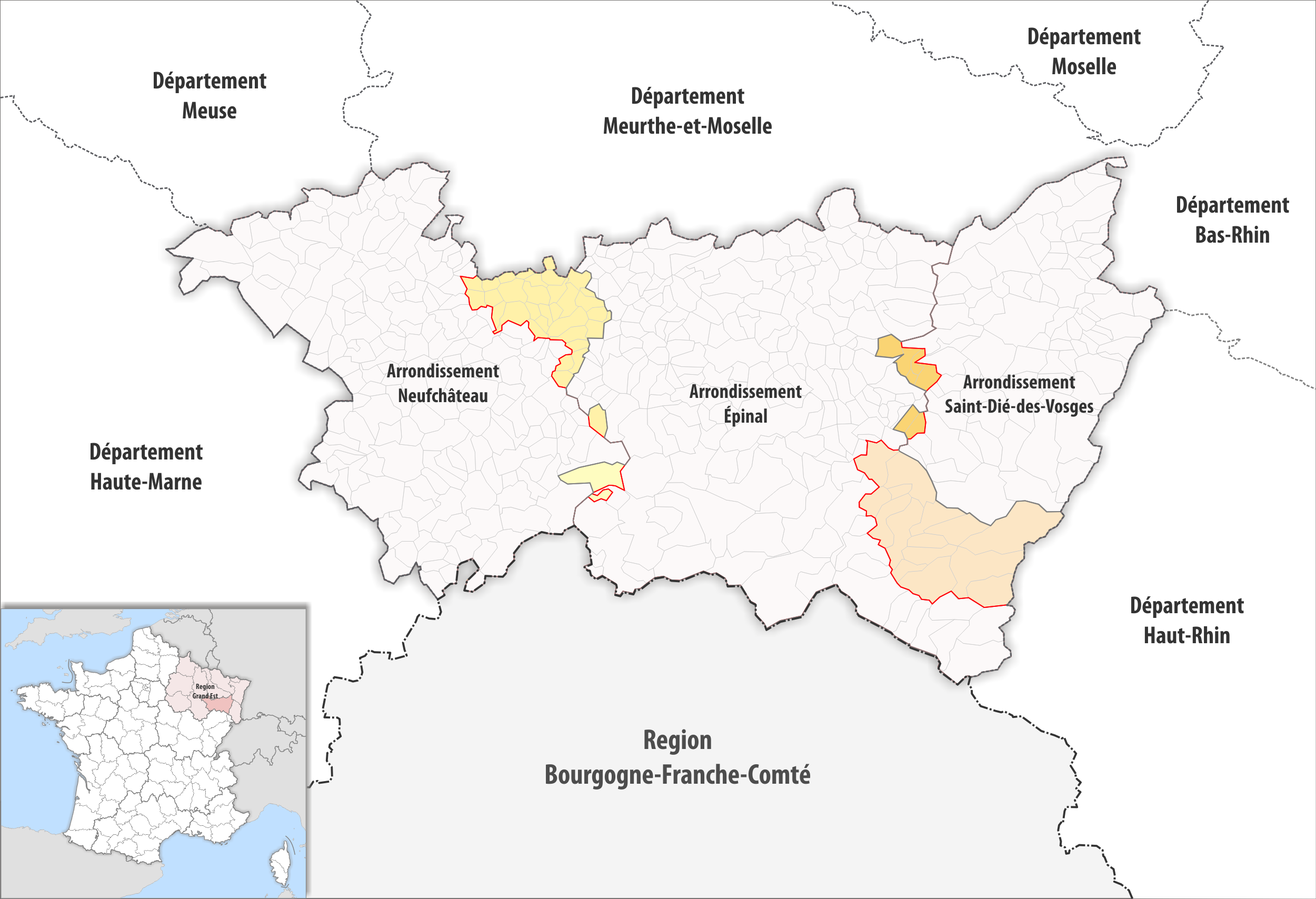 Arrondissements Anpassungen auf 2019 im Departement Vosges